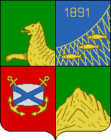 Герб города Тихоокеанск (1992). Упразднён в связи с переименованием города в ЗАТО Фокино